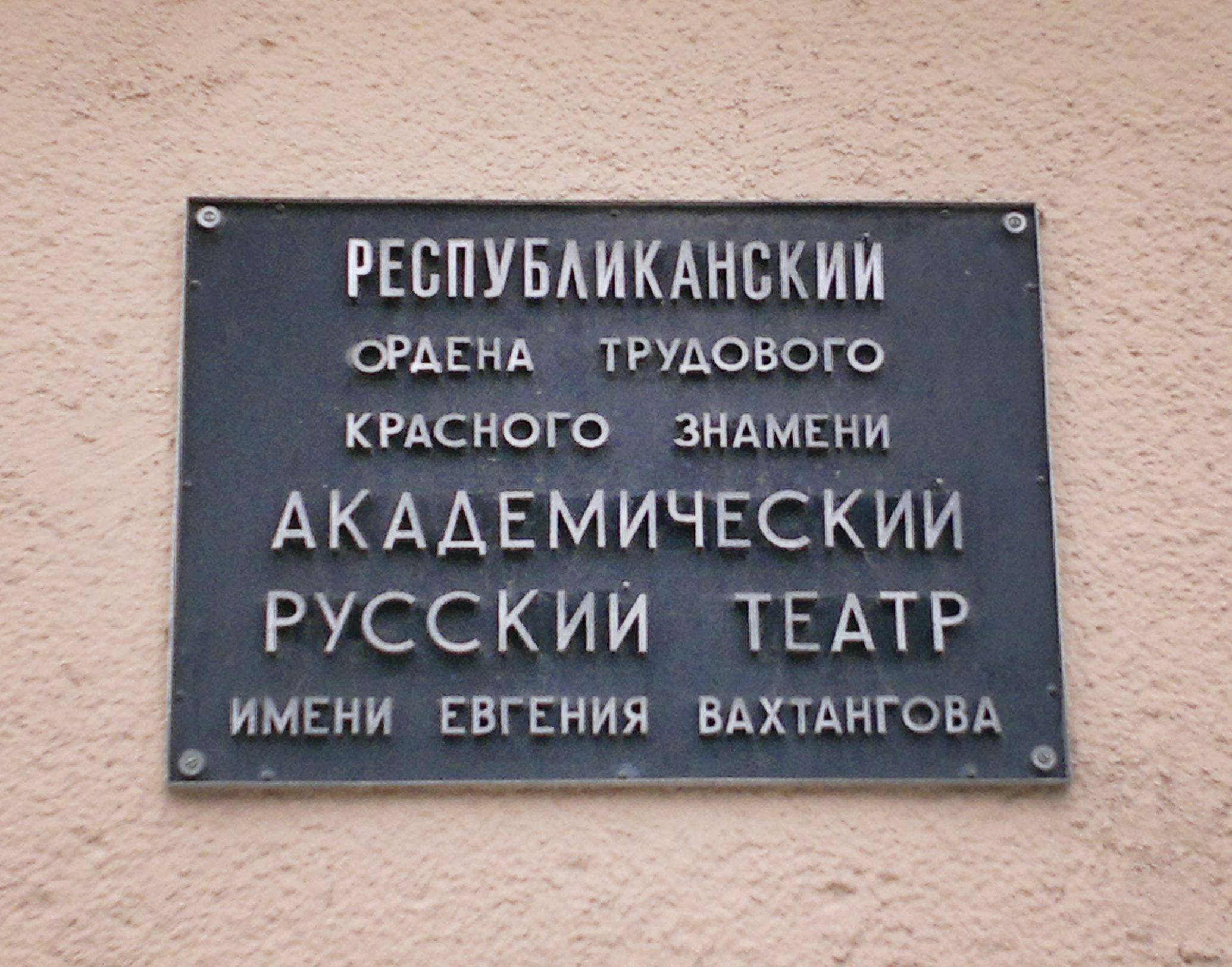 Русский театр